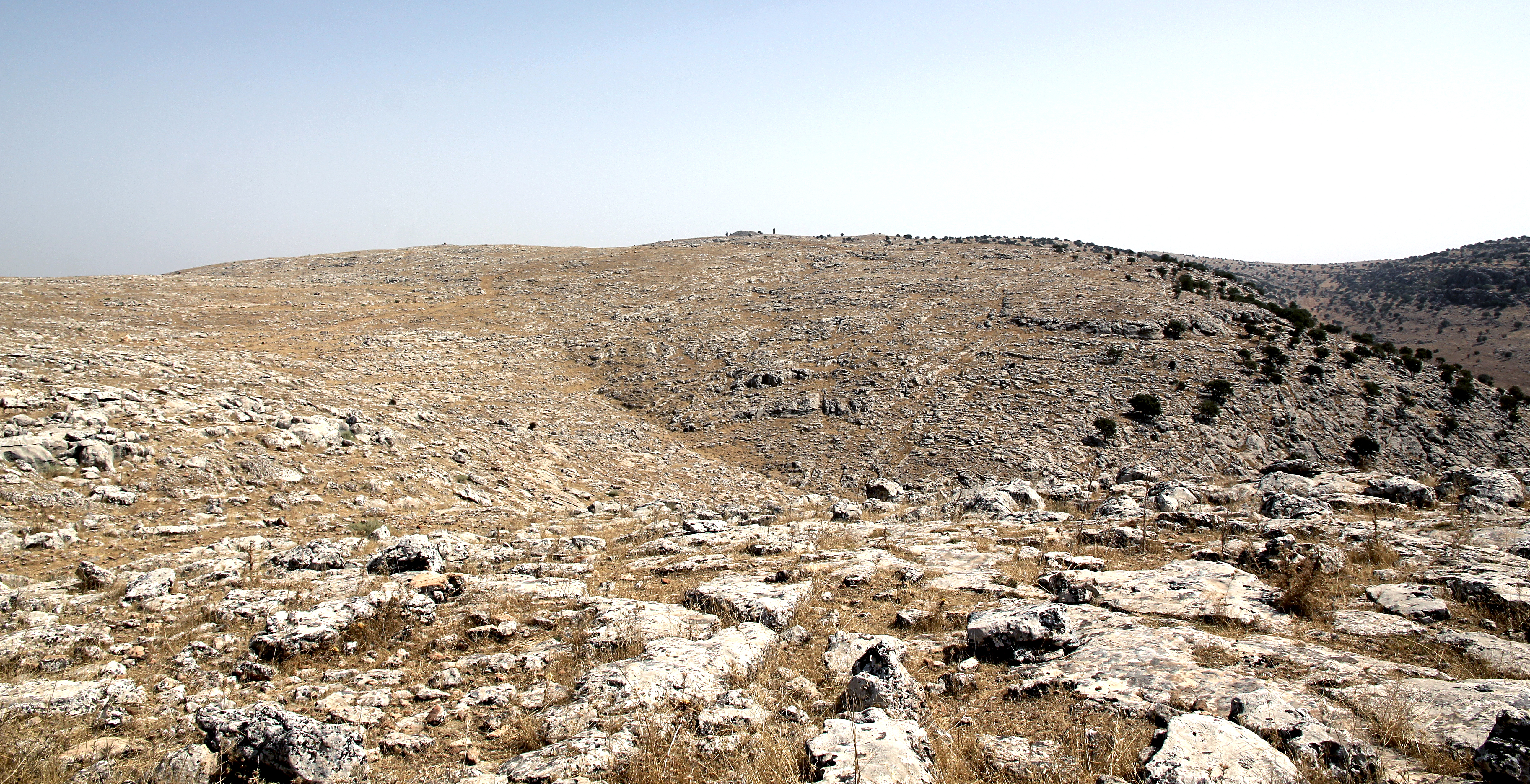 Grabhügel von Sesönk, Kommagene, Südosttürkei